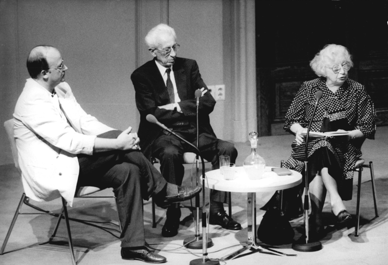 ADN-ZB Schindler 20.9.89 Berlin: Erinnerungen an Anne Frank In der Akademie der Künste las die Niederländerin Miep Gies aus ihrem Buch "Meine Zeit mit Anne Frank". Mitte: ihr Mann Jan [Gies]. Abgebildete Personen: Miep Gies, Schriftstellerin, Autorin, Niederlande (GND 118826204)